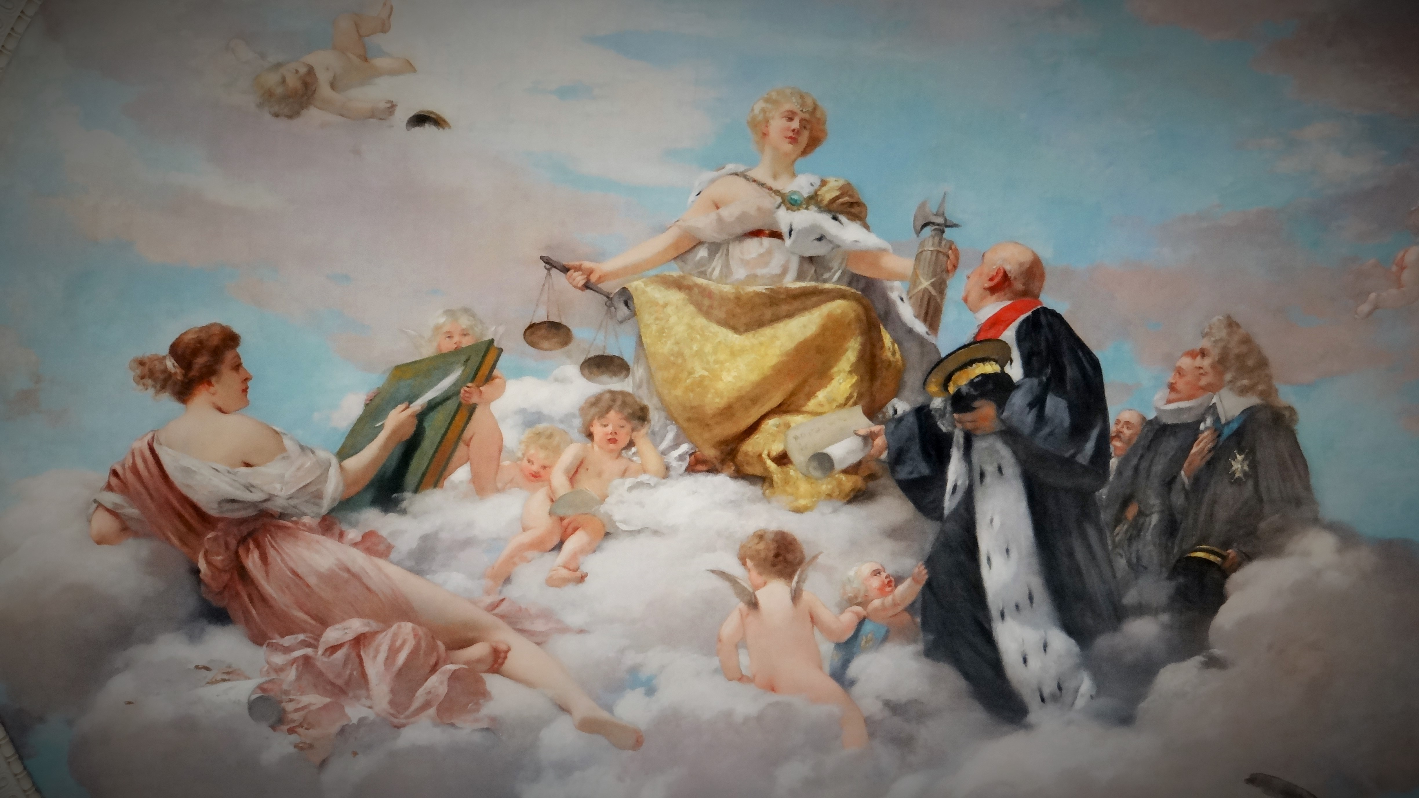 Cour des comptes, Paris, plafond du 2e étage de l'escalier d'honneur, Allégorie de la Justice, Henri Gervex, 1910. Le premier président Hérault remet un manuscit à l'allégorie de la Justice, tandis que l'allégorie de l'Histoire consigne l'évènement, sous le regard de magsitrat ancines et modernes de la Cour. Un hibou symbolise sagesse et vigilance. .